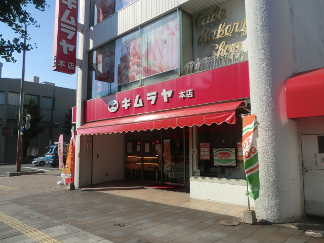 福岡県久留米市にあるキムラヤの本店です。